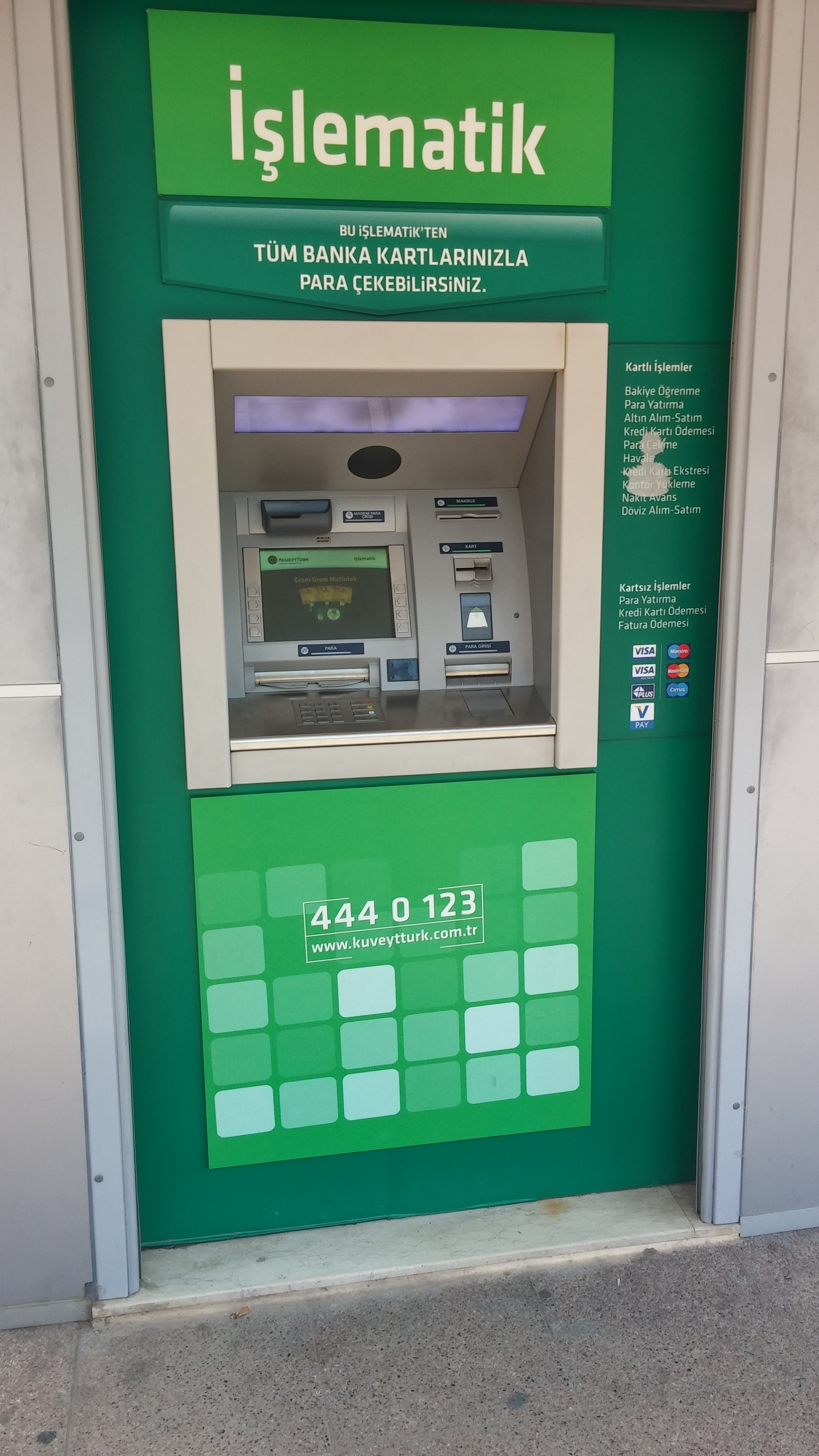 Pozcu'da bir Kuveyt Türk ATM'si.